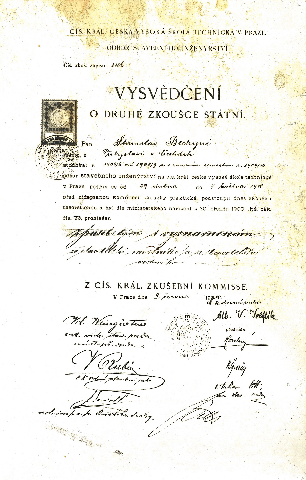 Stanislav Bechyně, Vysvědčení o provedené 2. státní zkoušce dne 9. června 1910